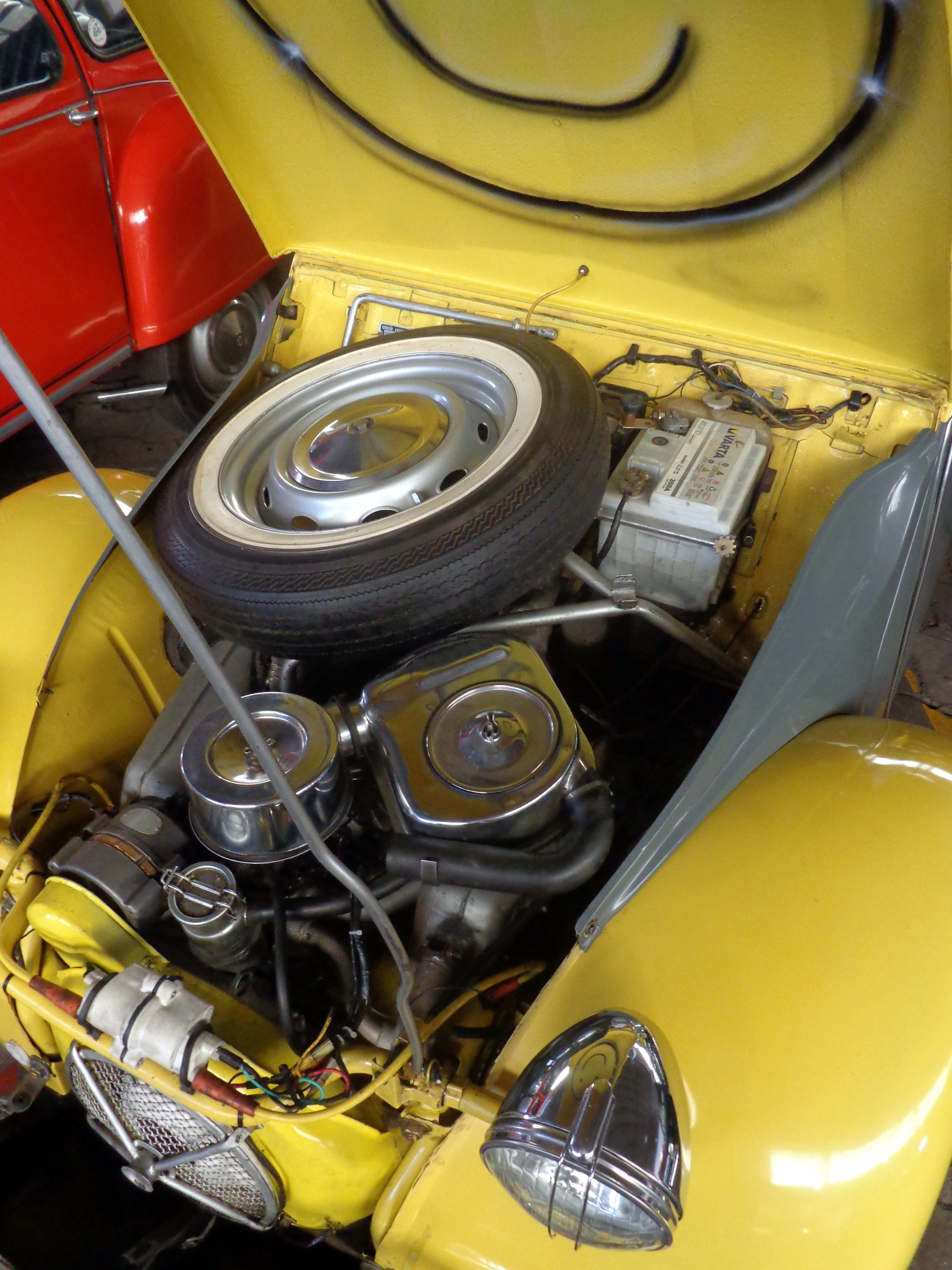 Motor de Citroën 3CV (ver [1]. Buenos Aires Argentina.